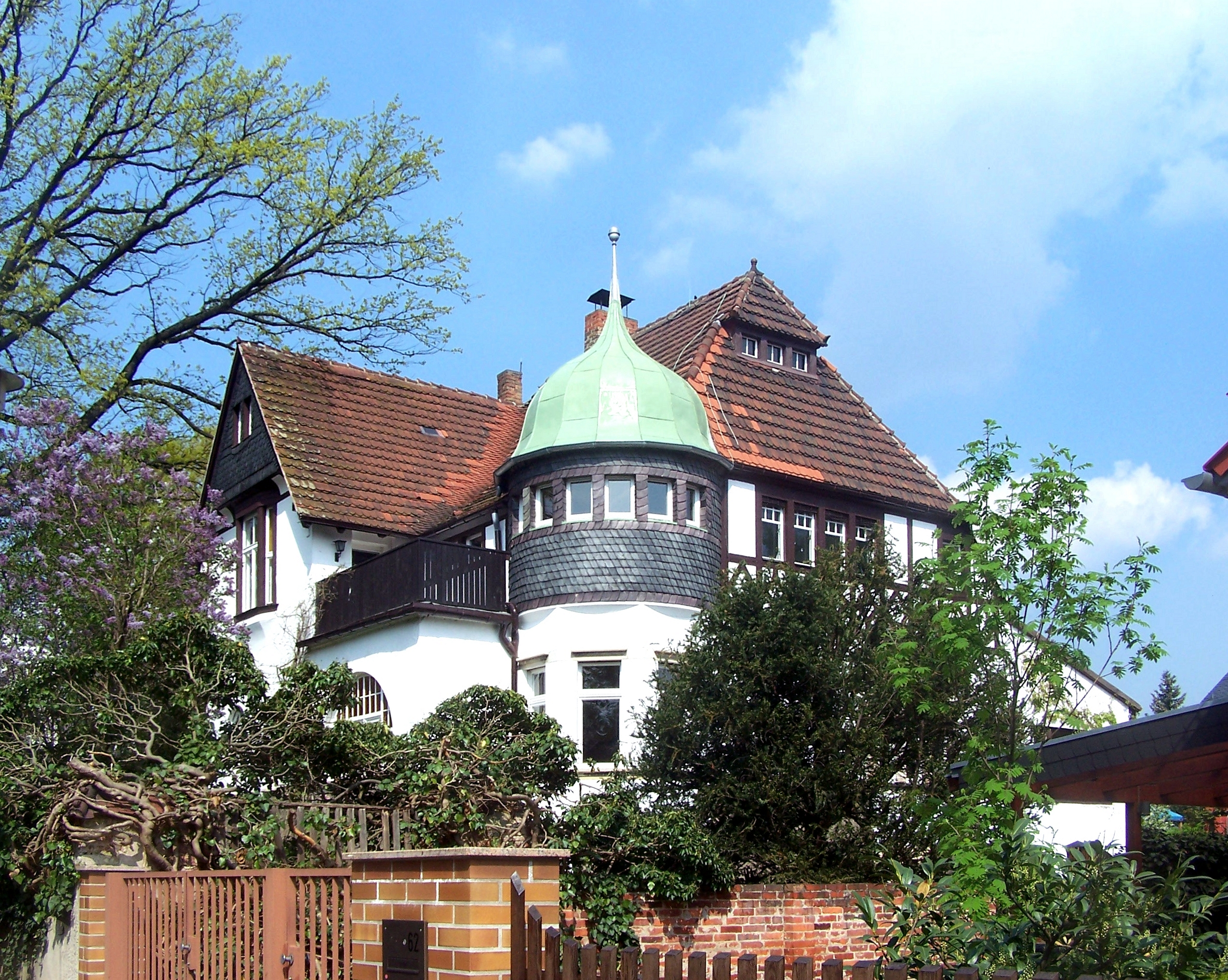 Wasastr. 64 in Radebeul